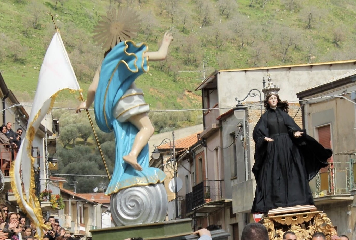 Affruntata immaggine copertina